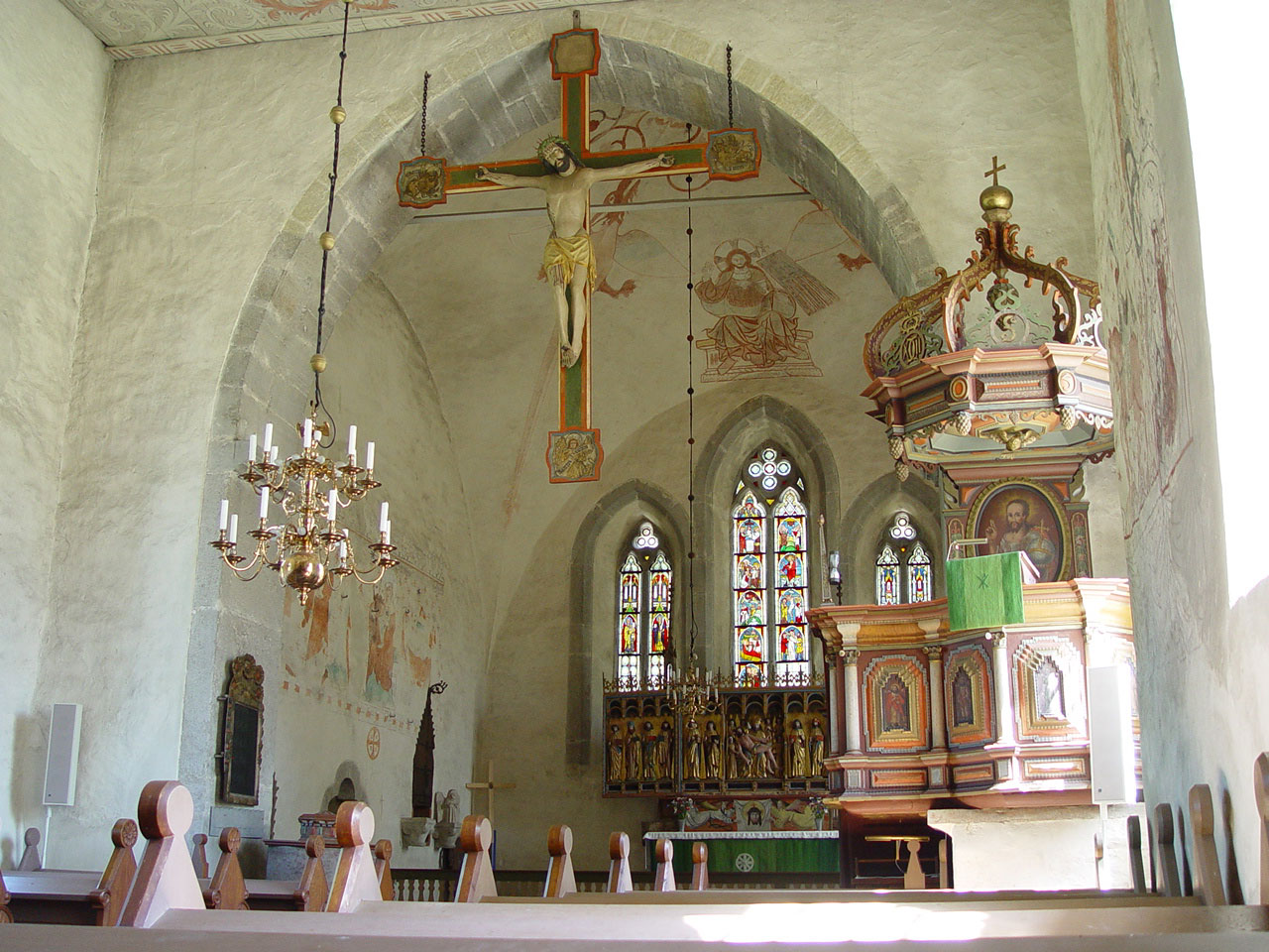 Lye kyrka auf Gotland. Triumphkruzifix (1496), Kanzel (1705)